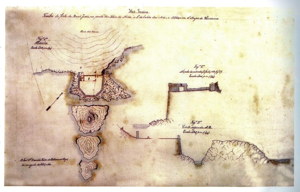 "Tombo do Forte do Bom Jesus na ponta dos Ilhéus da Mina...", Ilha Terceira (Açores), Portugal.